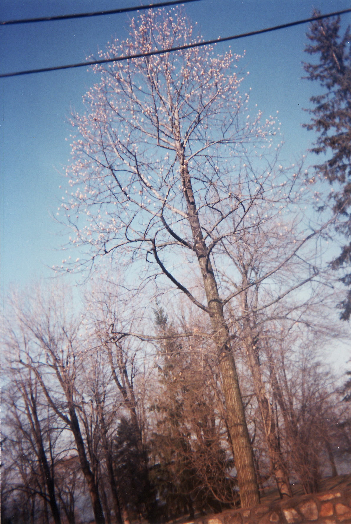 Liriodendron tulipifera at Senneville